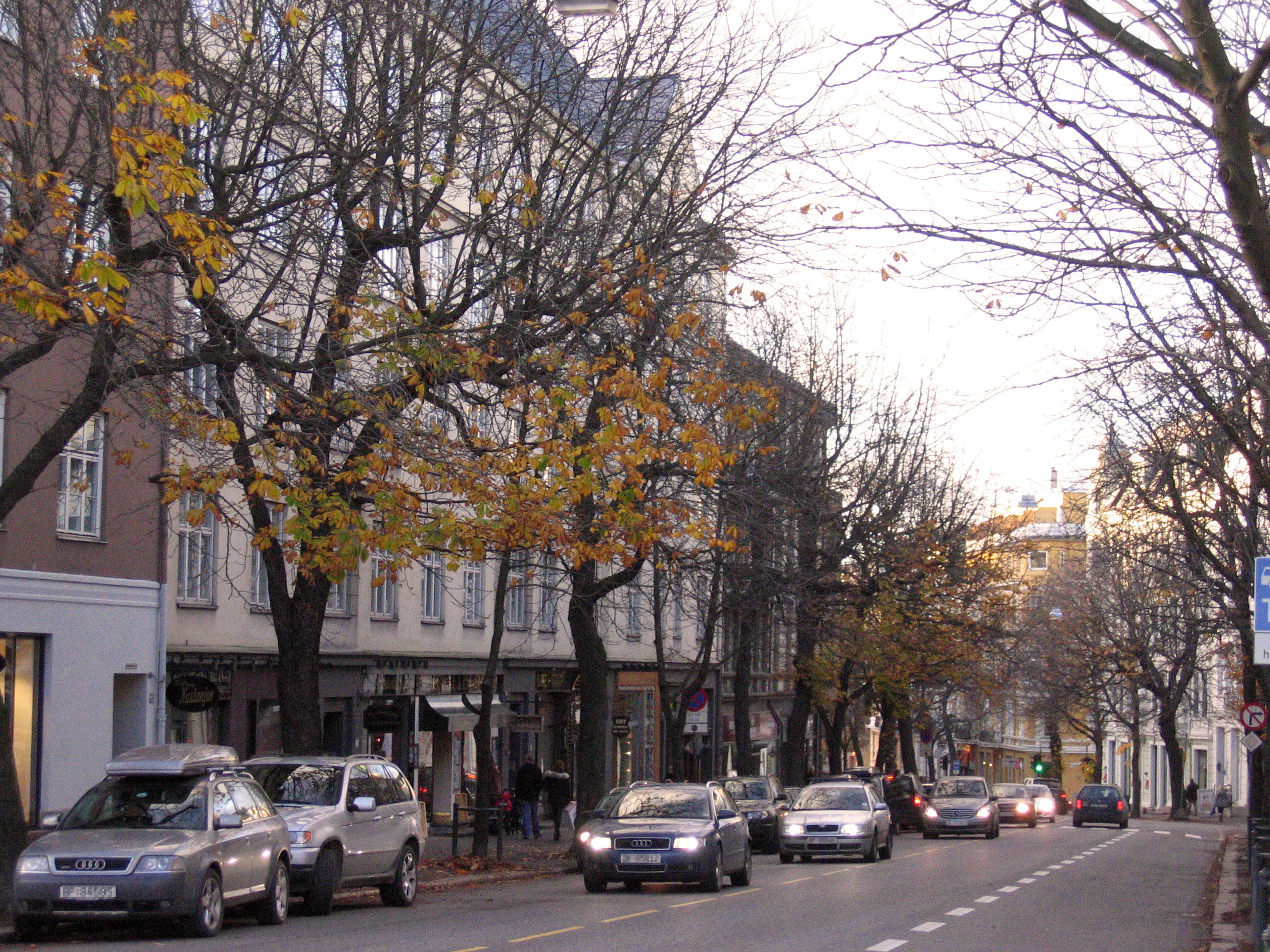 Bygdøy Allé, Oslo, Norway.